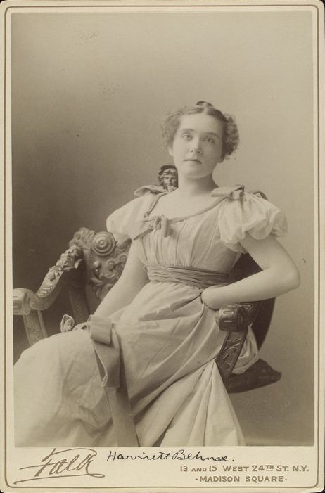 Harriet Behne